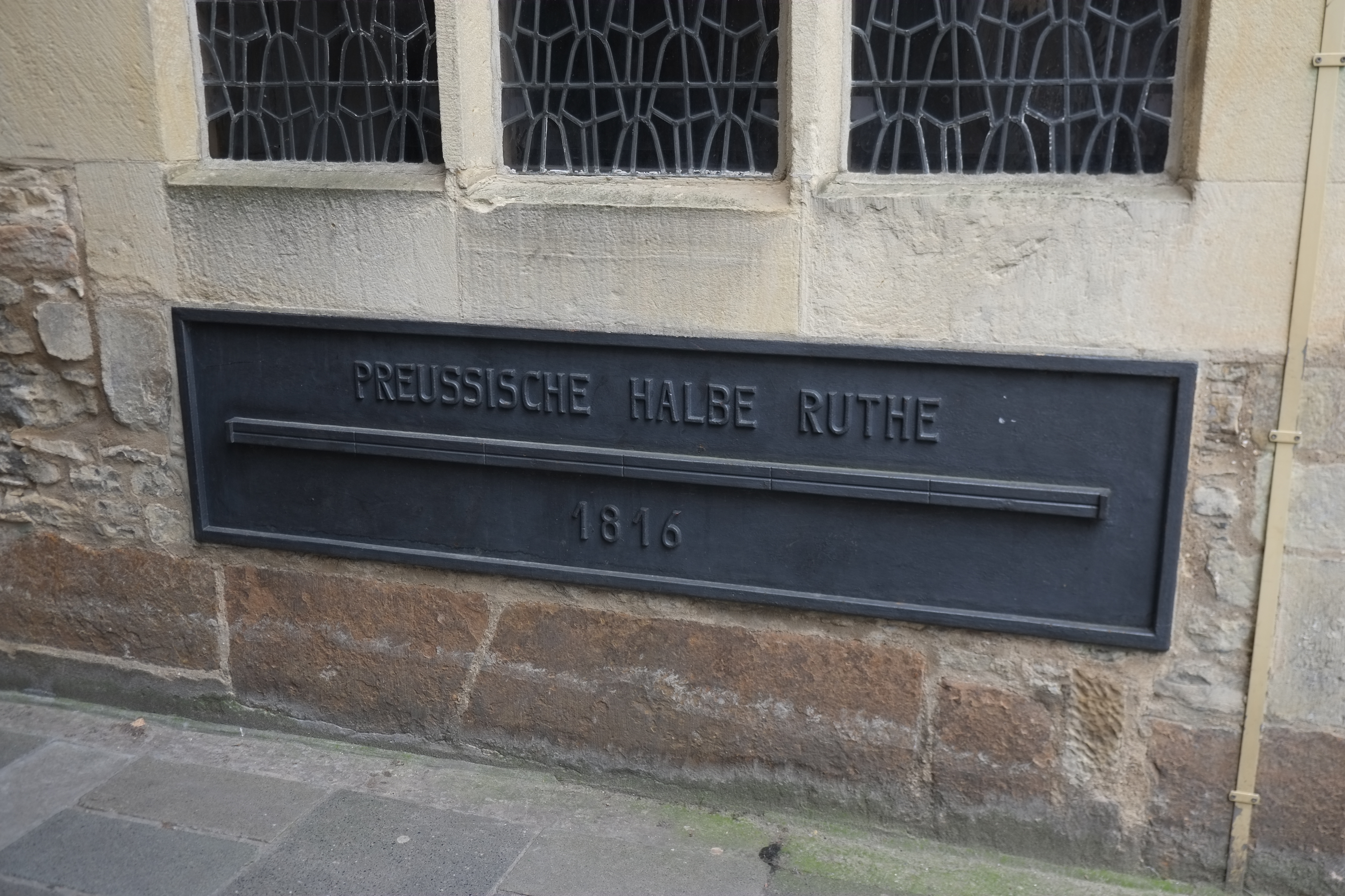 "Preußische Halbe Ruthe" am Rathaus von Münster